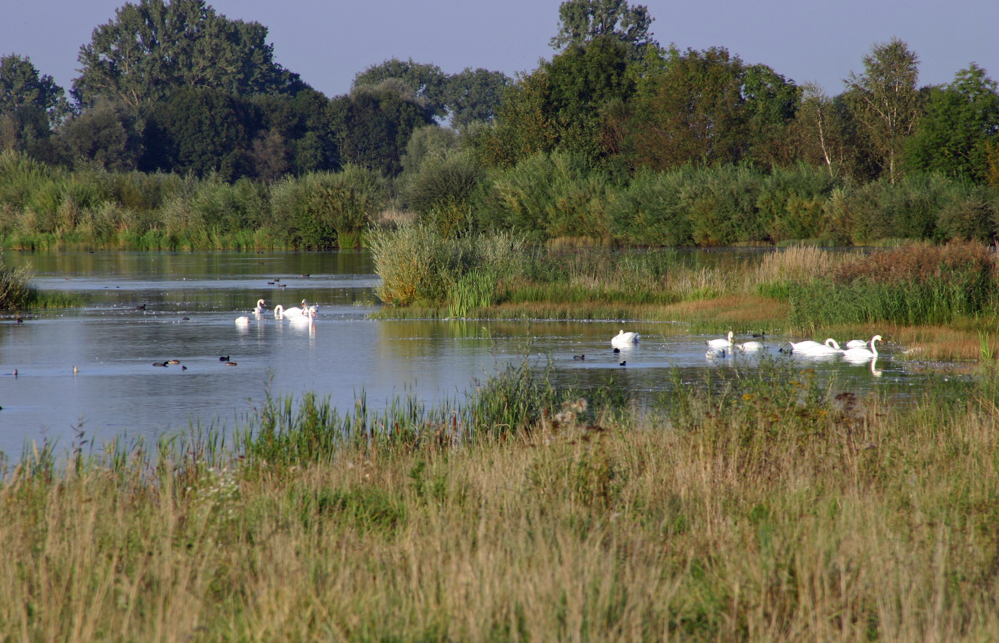 Vögel im herbstlichen Sophienried